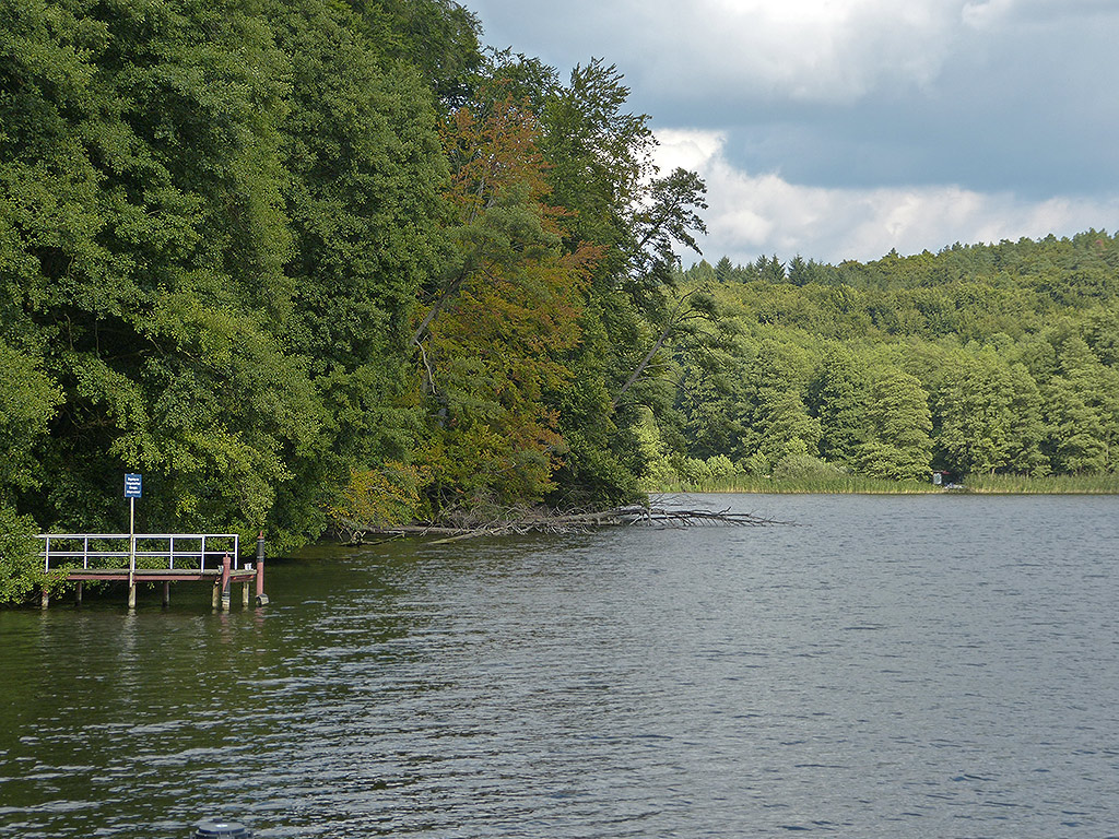 Tornowsee, Dampferanlegestelle Boltenmühle